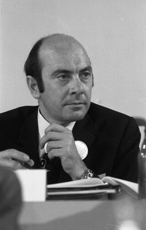 CDU-Parteitag 1972 in der Wiesbadener Rhein-Main-Halle (Manfred Hermann Wörner) 9.-11.10.1972